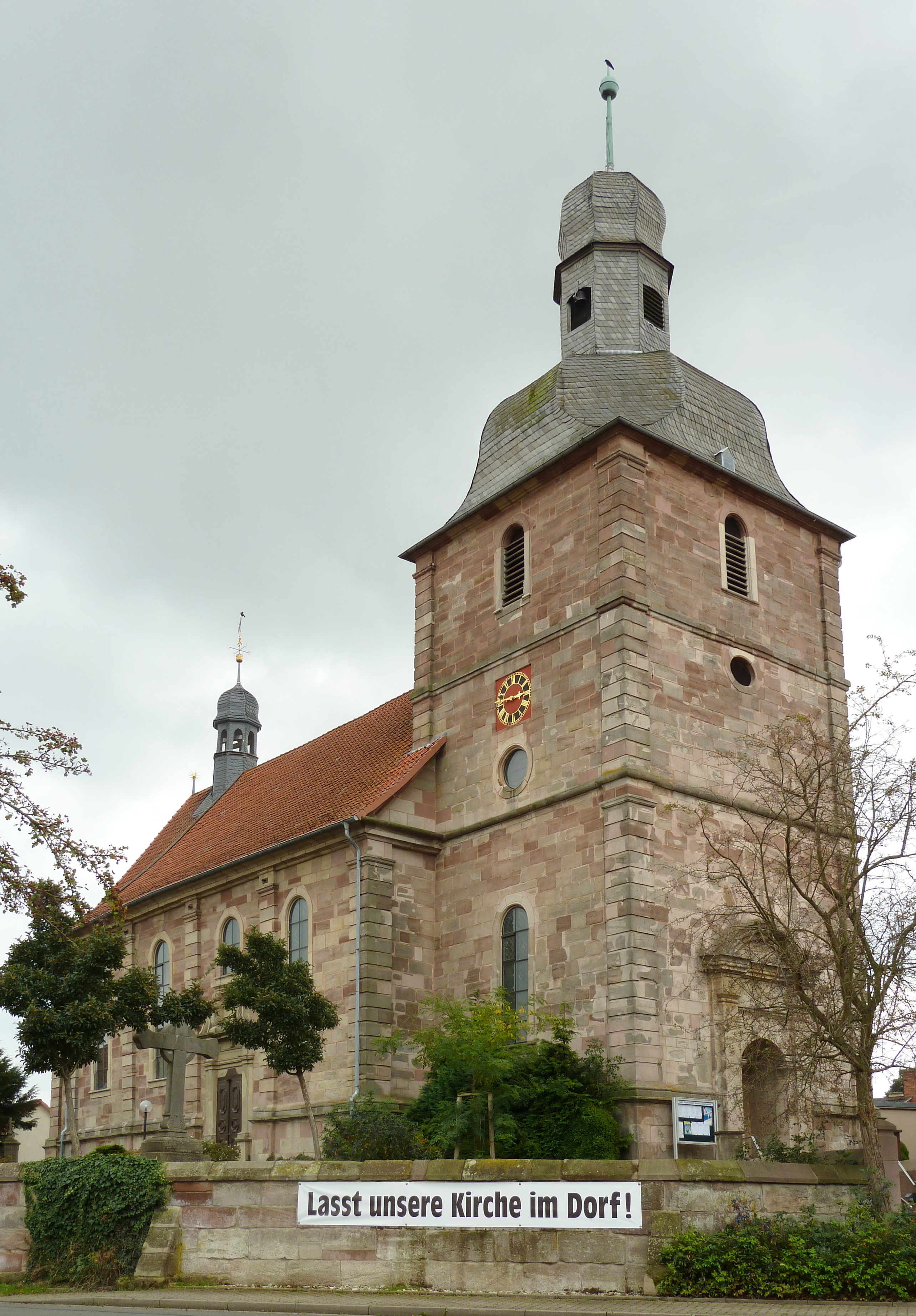 Katholische Kirche St. Mauritius in Desingerode, Stadt Duderstadt, Niedersachsen. Erbaut 1752–54